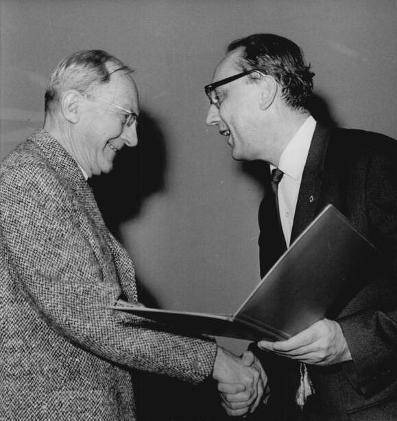 Zentralbild Hochneder 1.11.1968 Berlin: Feierstunde anläßlich der Gründung des "Bundes proletarischer Revolutionärer Schriftsteller" Anläßlich der Gründung des "Bundes proletarischer revolutionärer Schriftsteller" im Jahre 1928 fand am 1.11.1968 im Klub der Kulturschaffenden in Berlin eine Feierstunde statt. Im Verlauf der Feierstunde überreichte der 1. Sekretär des Kulturbundes, Gerhard Henninger (r), verdienstvollen Schriftstellern, wie hier Prof. Ludwig Renn, eine Erinnerungsmünze.